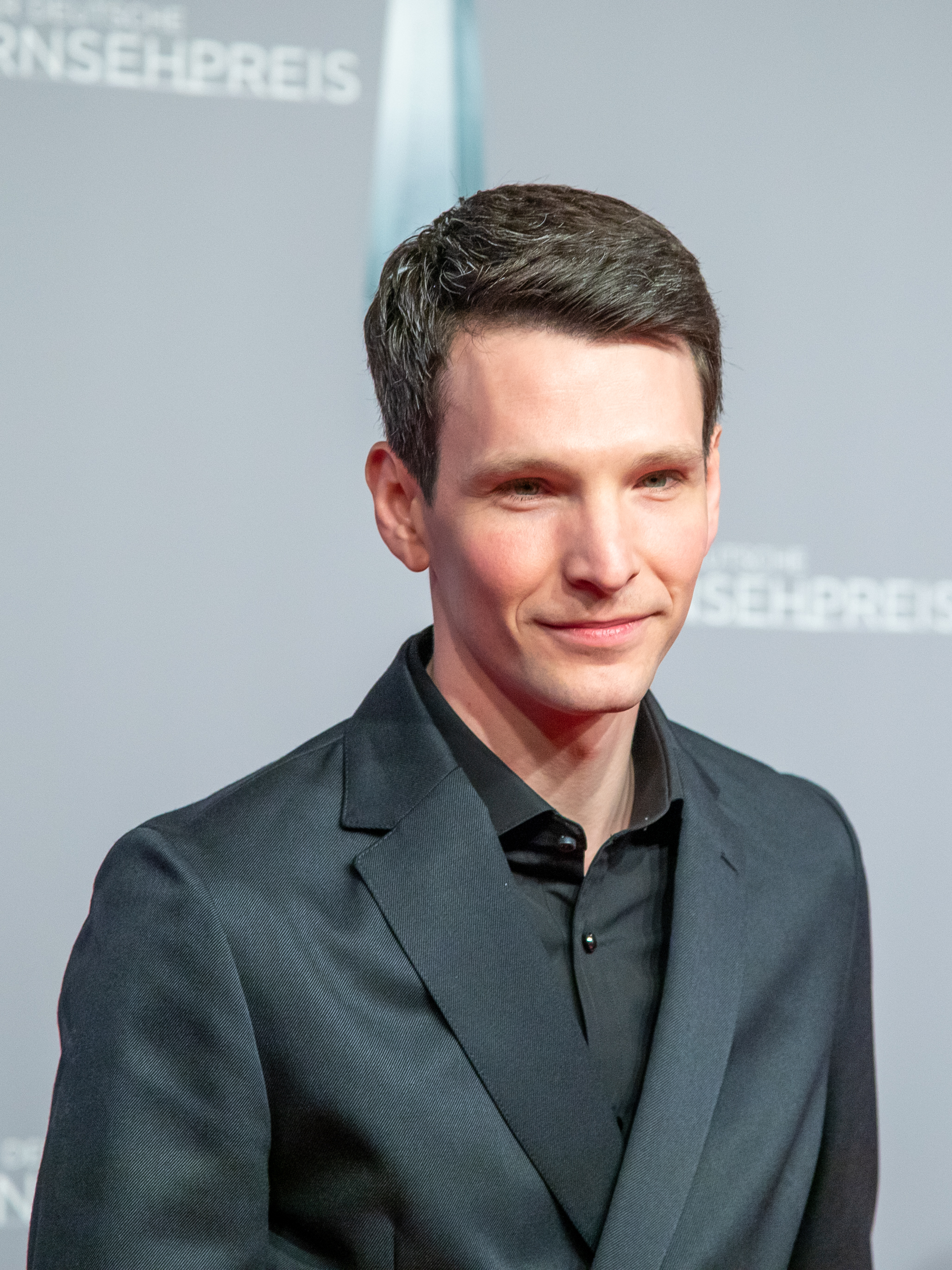 Sabin Tambrea beim Deutschen Fernsehpreis 2019 in der Düsseldorfer Rheinterrasse